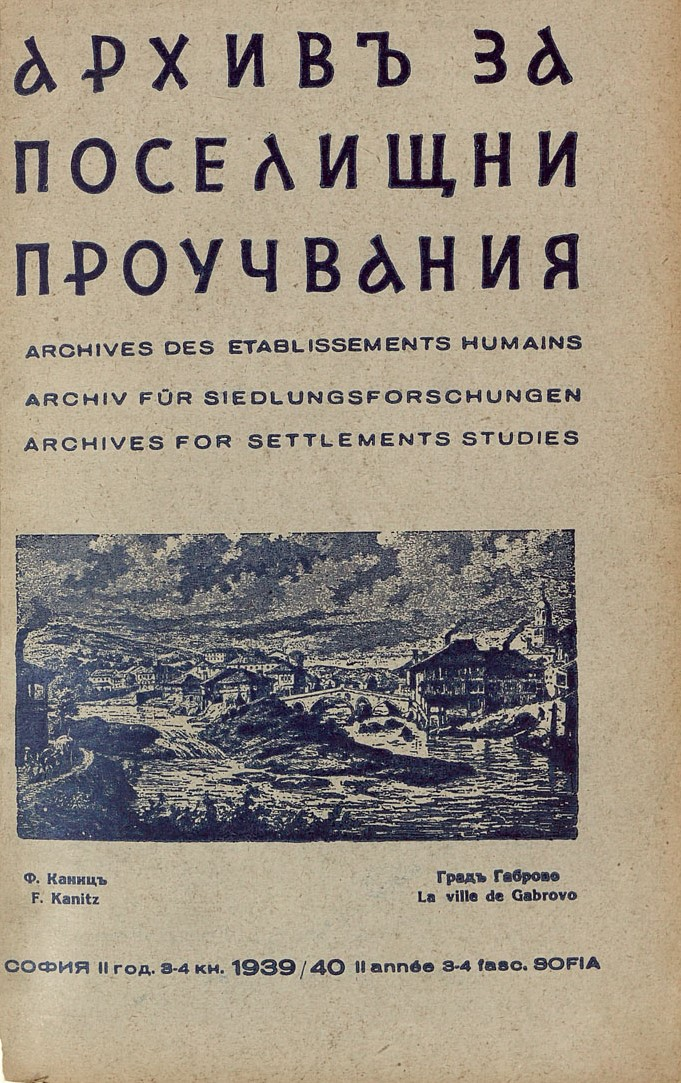 Факсимиле на заглавната страница на списание "Архив за поселищни проучвания", кн. 3-4, 1941 г.